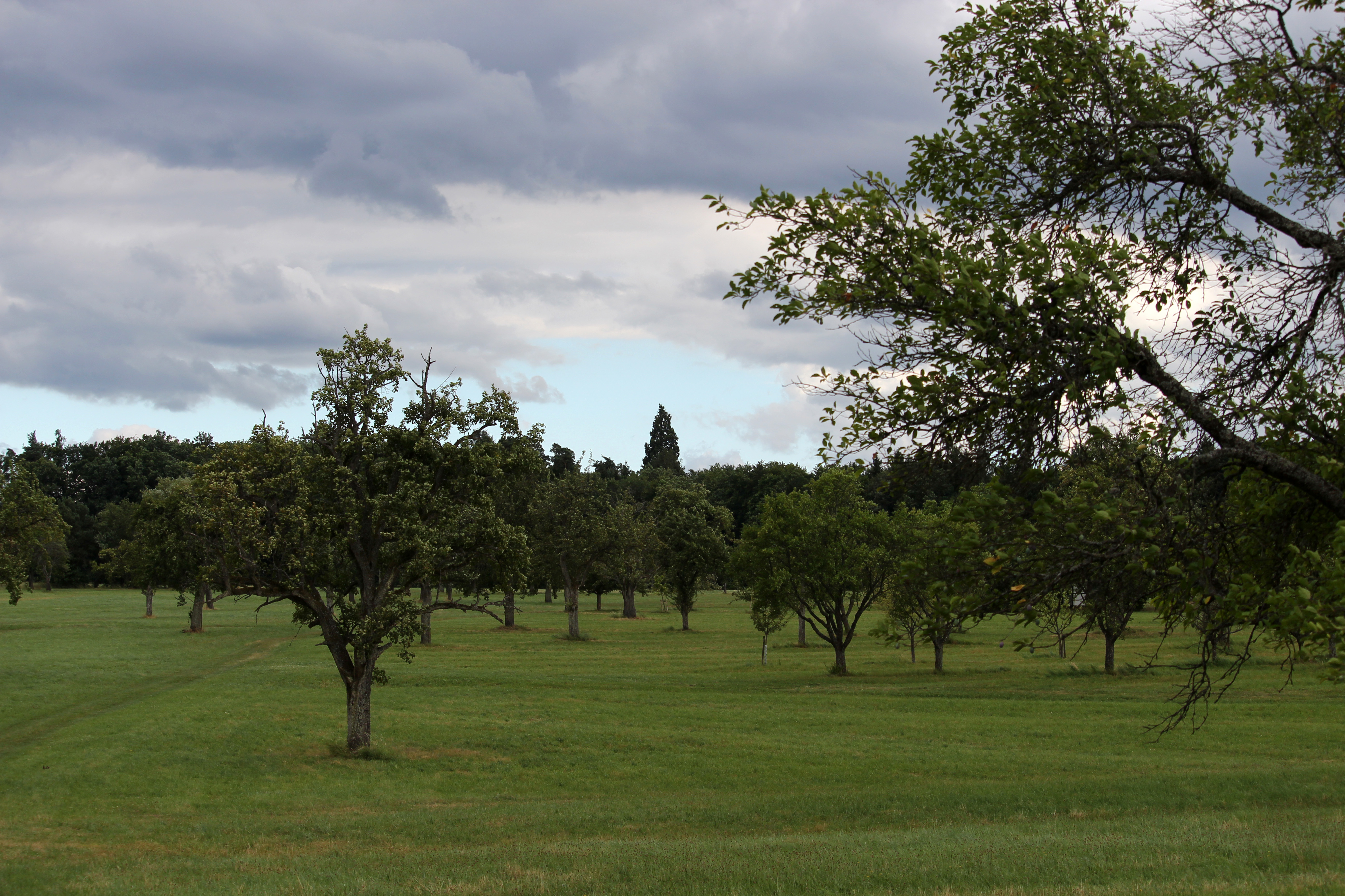 Die Streuobstwiese Braunäcker vor dem Schönbuchrand. Der Mammutbaum überragt die übrigen Bäume deutlich, Entfernung Fotoapparat/Baum rund 700 m.